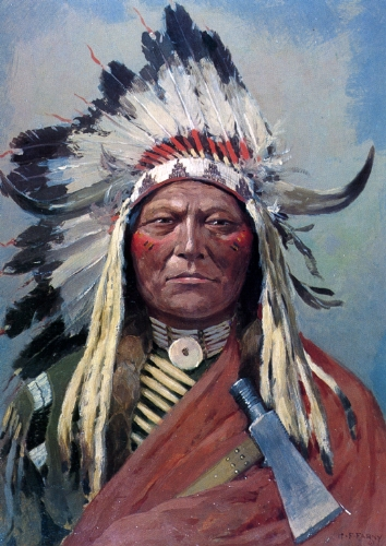 Sitting Bull.